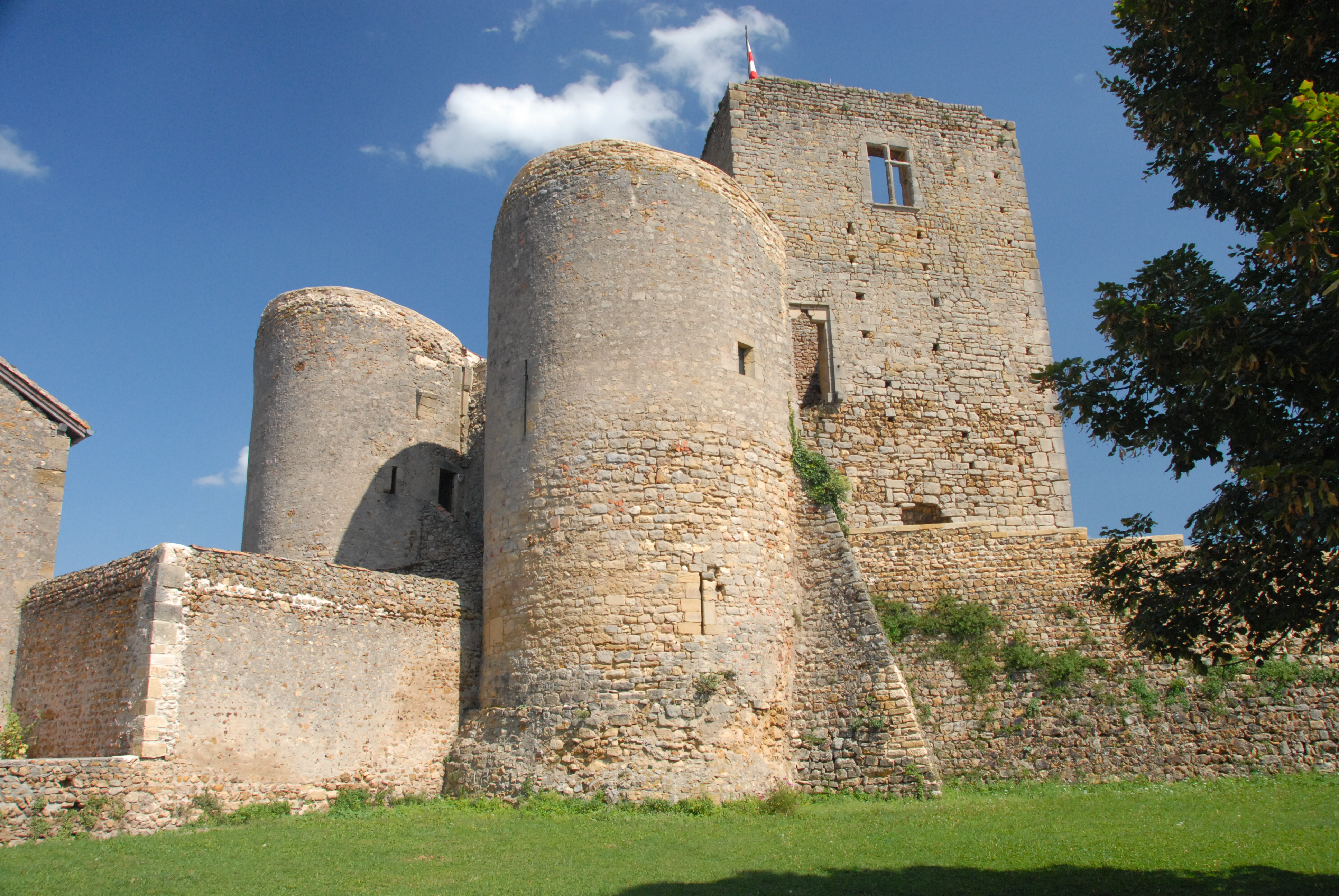 Semur-en-Brionnais, Burg